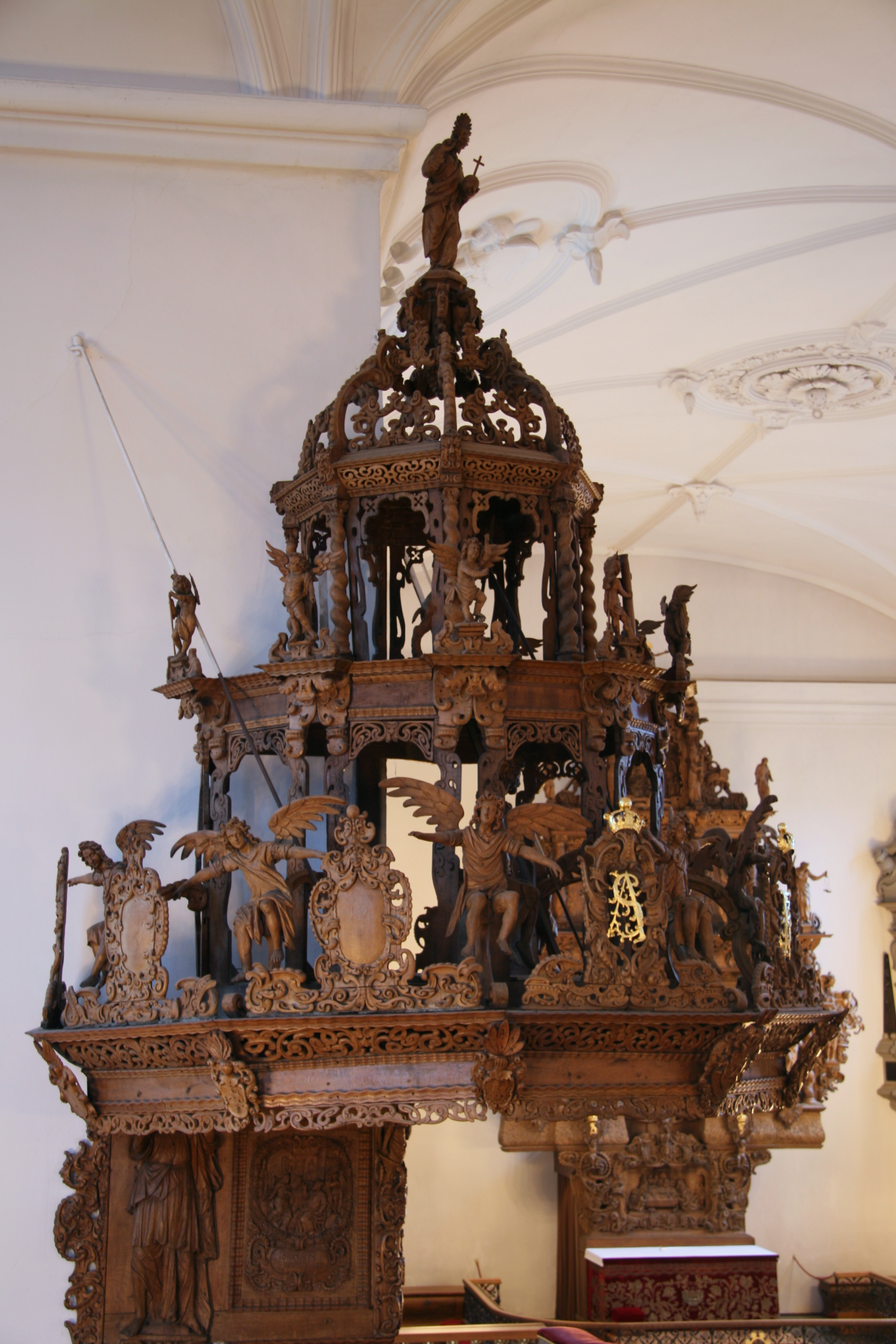 Holmens Kirke, Copenhagen, Denmark . Prædikestolens lydhimmel.